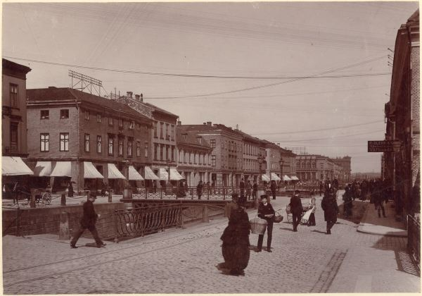 Östra Hamngatan före Östra Hamnkanalens igenläggning åren närmast sekelskiftet. Till vänster med fönstermarkiser, nr 39 och 37, följda av det något lägre nr 35 - Kyrkogatan 27. Bron är Östra Kungsgatubron